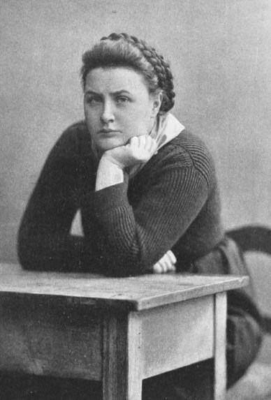 Else Lehmann im Stück "Fuhrmann Henschel" von Gerhart Hauptmann am Deutschen Theater Berlin